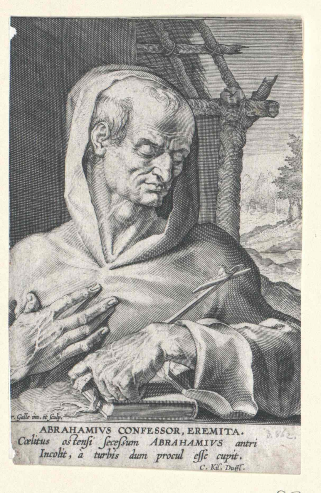 Kupferstich - der Heilige Abraham von Kiduna